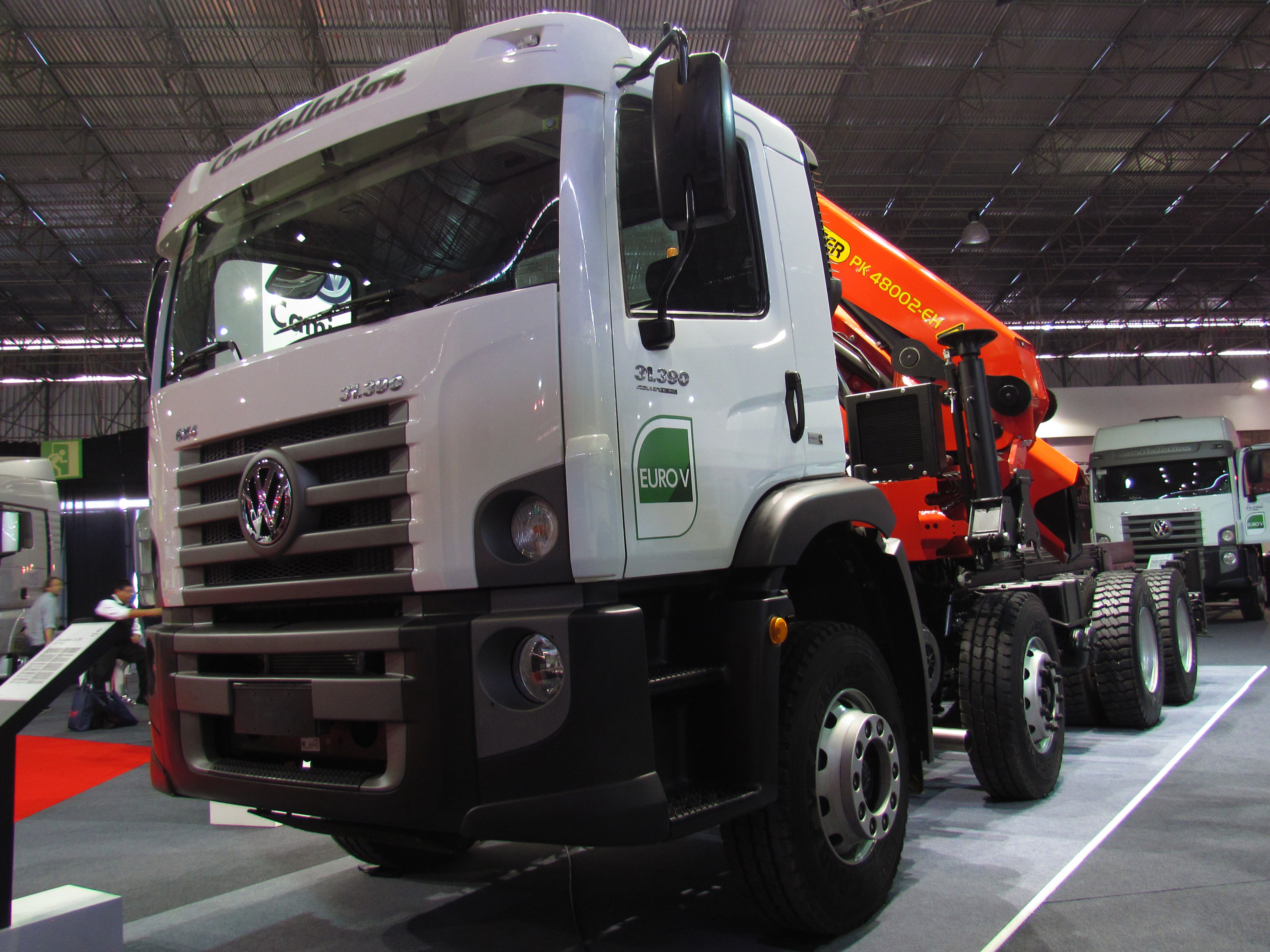 Volkswagen 31.390 Constellation 8x4 2014